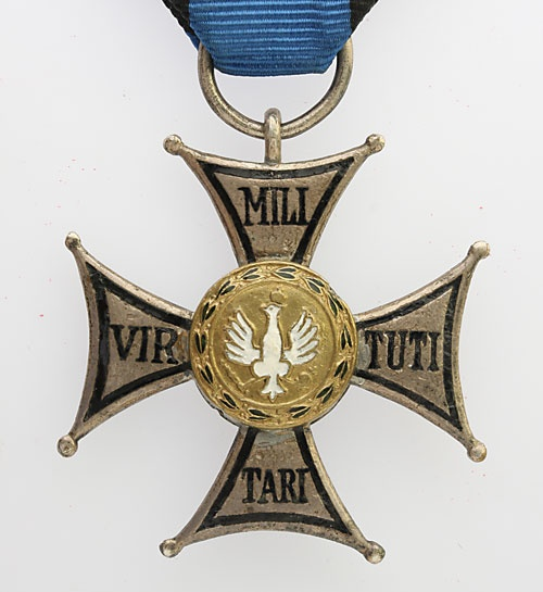 Krzyż Srebrny Orderu Wojennego Virtuti Militari Boruty